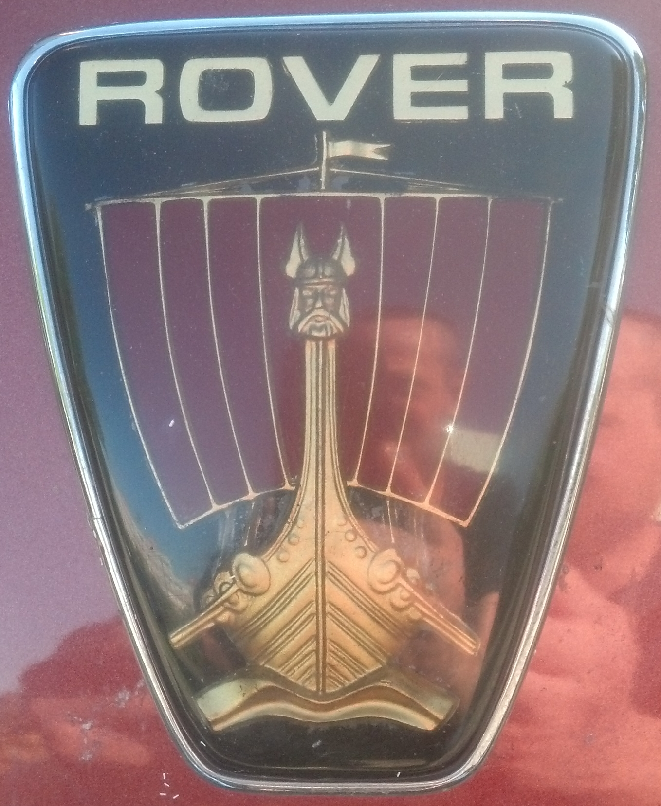 Detail loga Rover na automobilu Rover SD1 - foceno na mezinárodním srazu MG Rover klubu v Brně, květen 2017